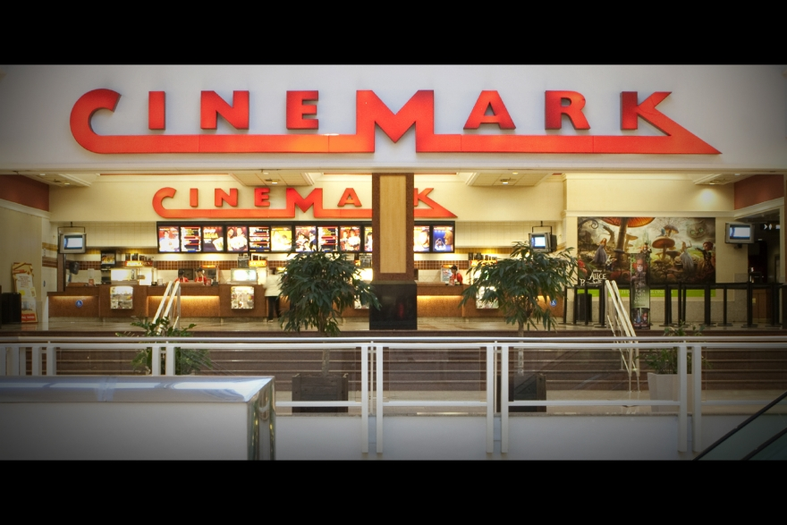 Fachada do Cinemark Mueller de Curitiba, PR